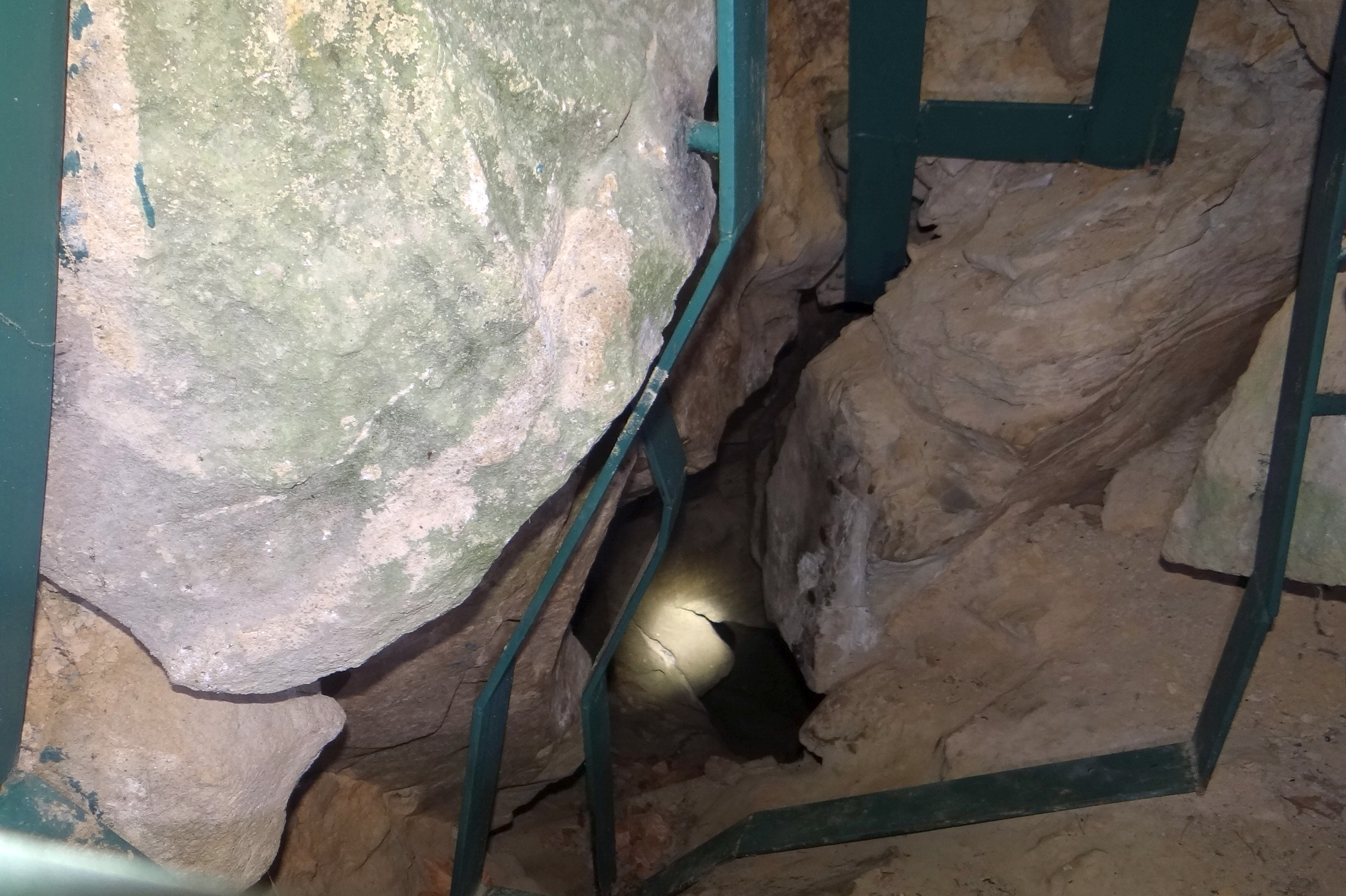 Diabla Dziura w Bukowcu